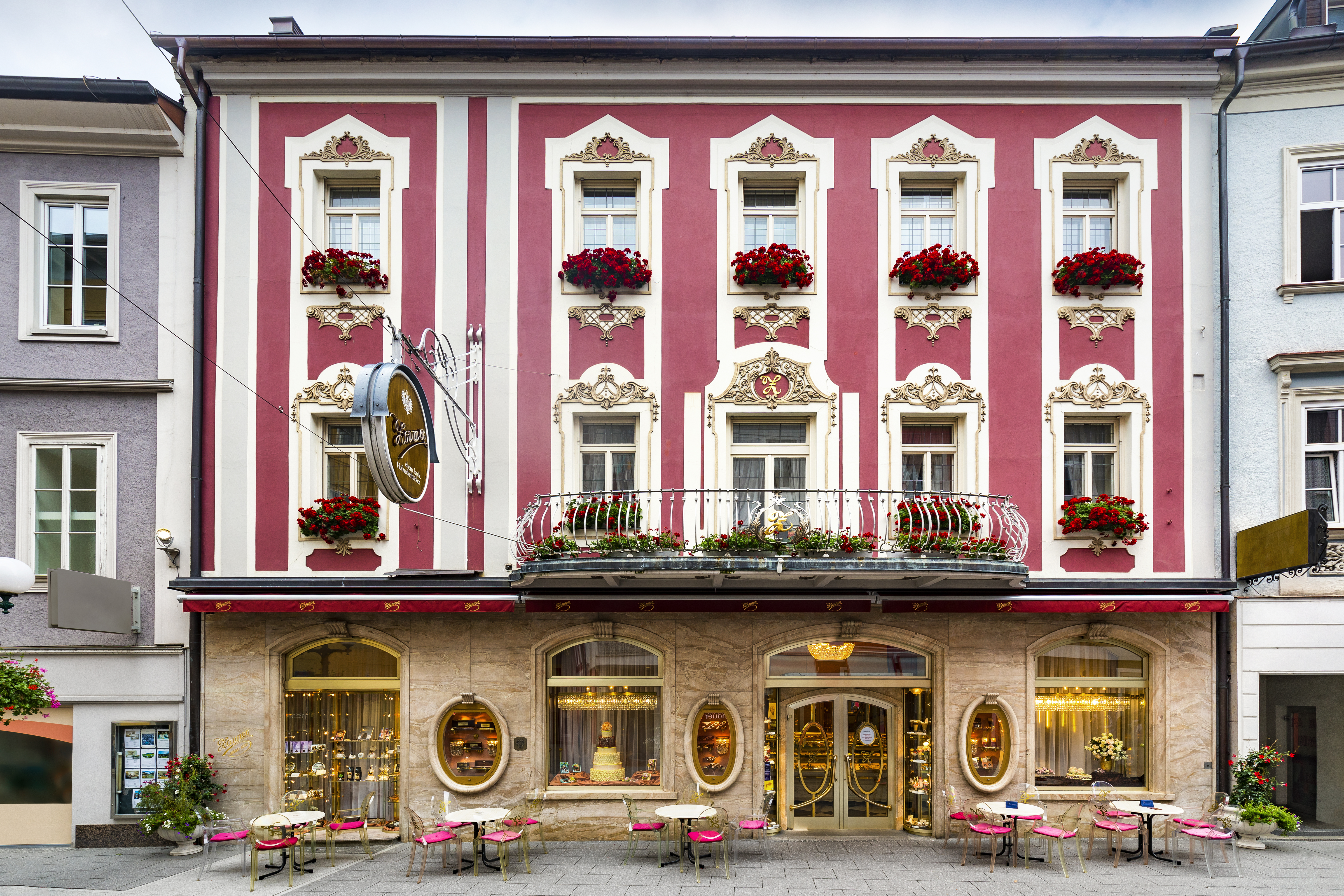 Fassade Stammhaus in der Pfarrgasse